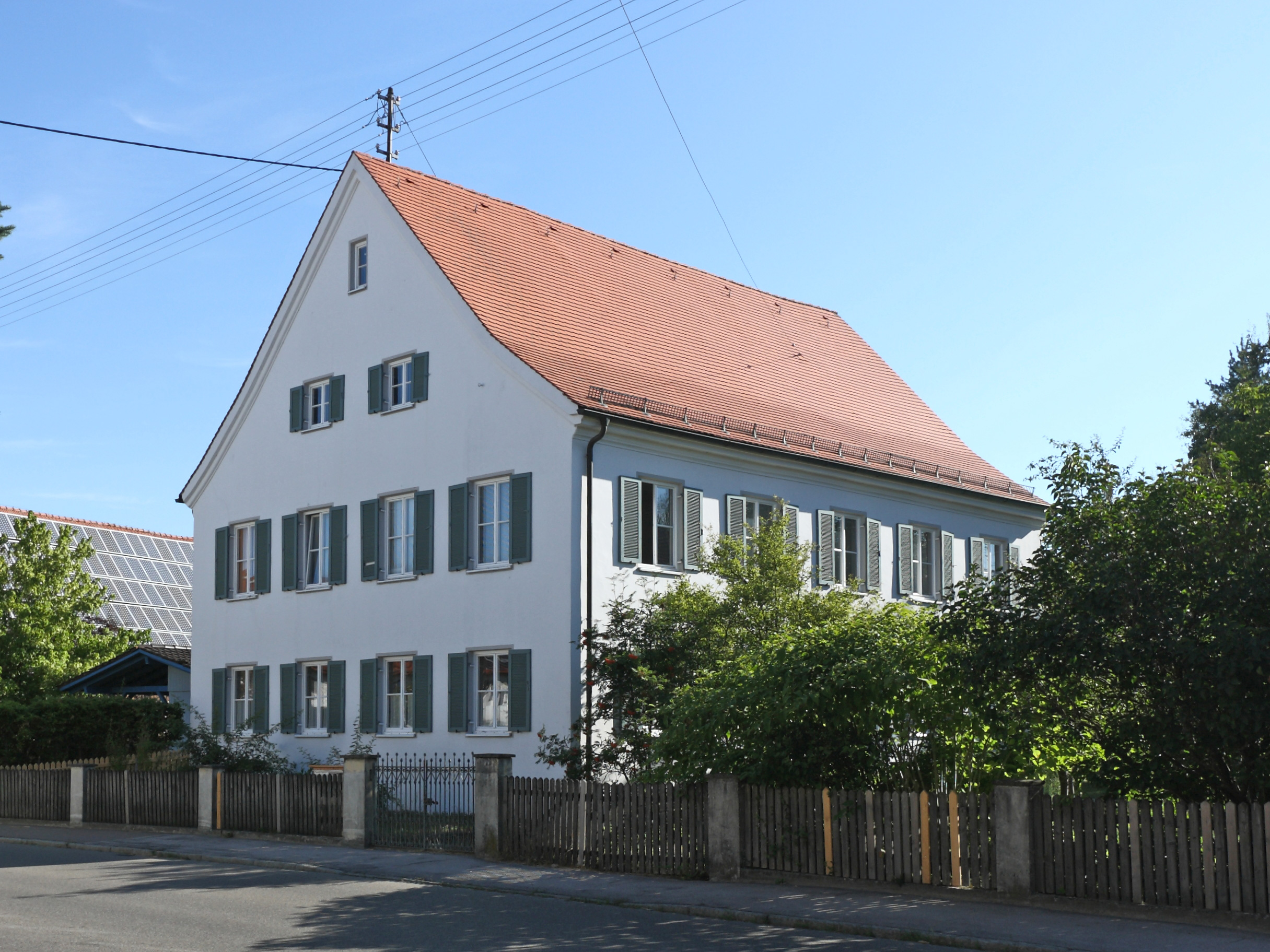 Ehem. Pfarrhaus Loppenhausen, jetzt Kindergarten